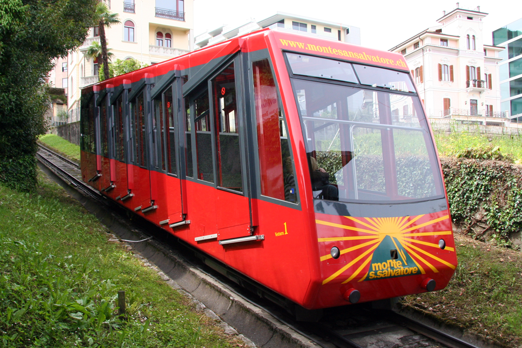 Wagen der San-Salvatore-Bahn der 4. Generation unmittelbar vor der Einfahrt in die Talstation in Paradiso